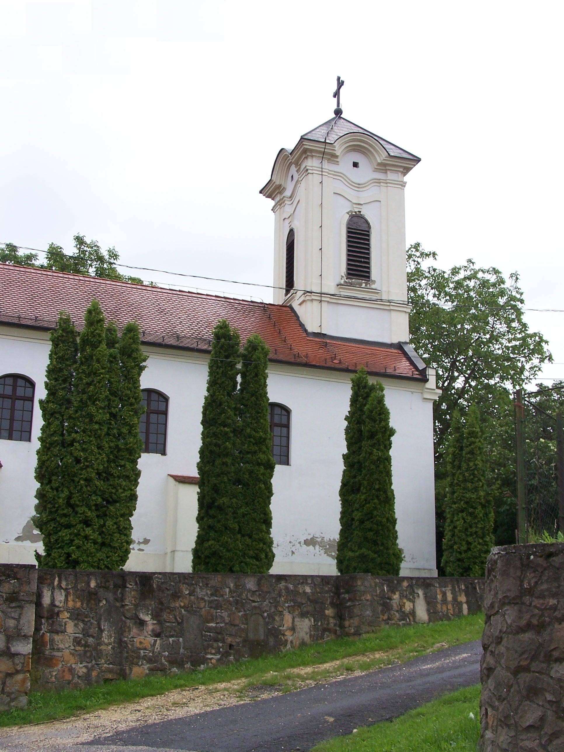 Görögkeleti (szerb) templom (Csobánka, Hősök tere 4.)